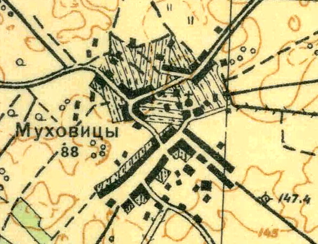 Топографическая карта Ленинградской области, квадрат О-35-11-Г-г (Муховицы), деревня Муховицы.